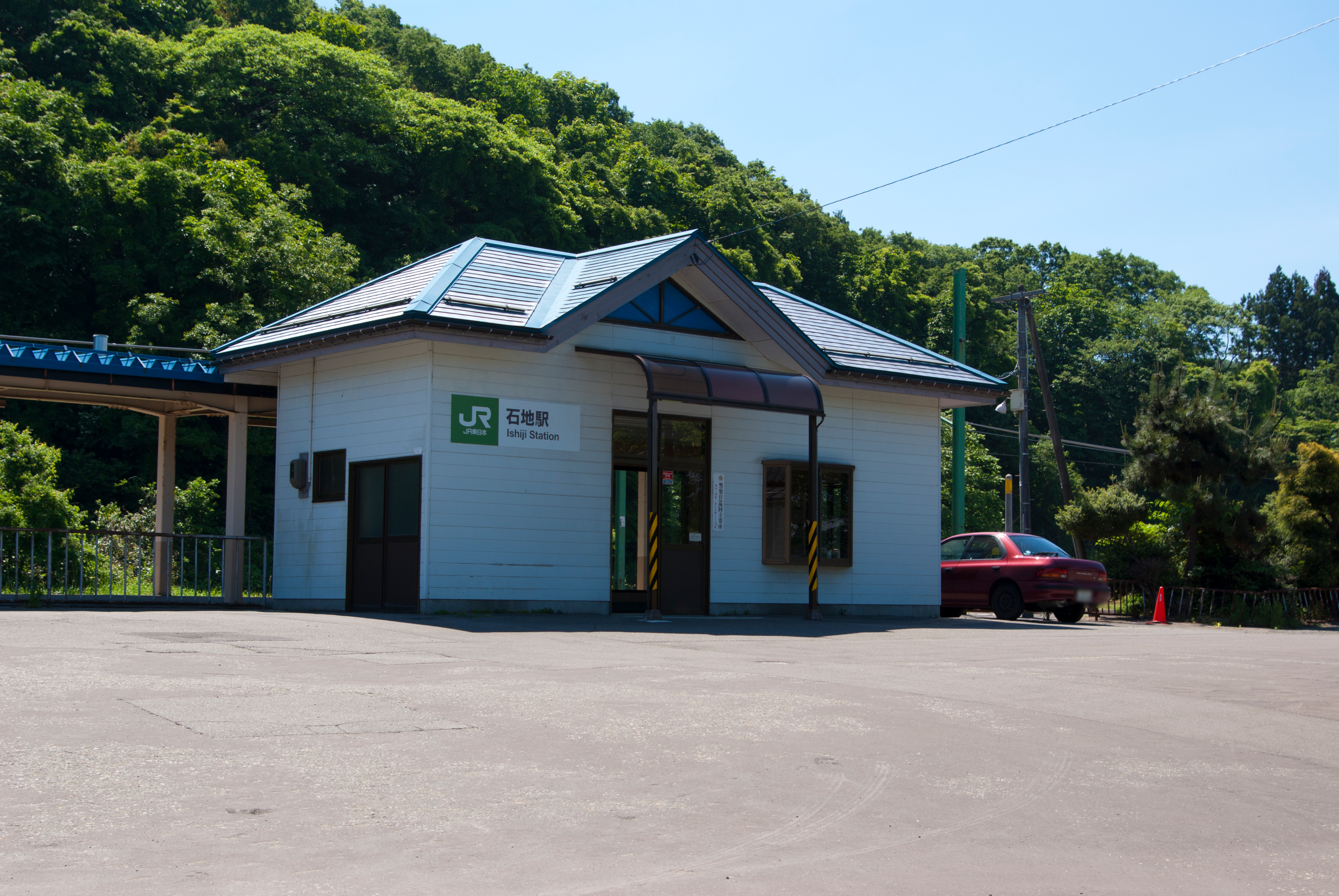 東日本旅客鉄道株式会社越後線石地駅